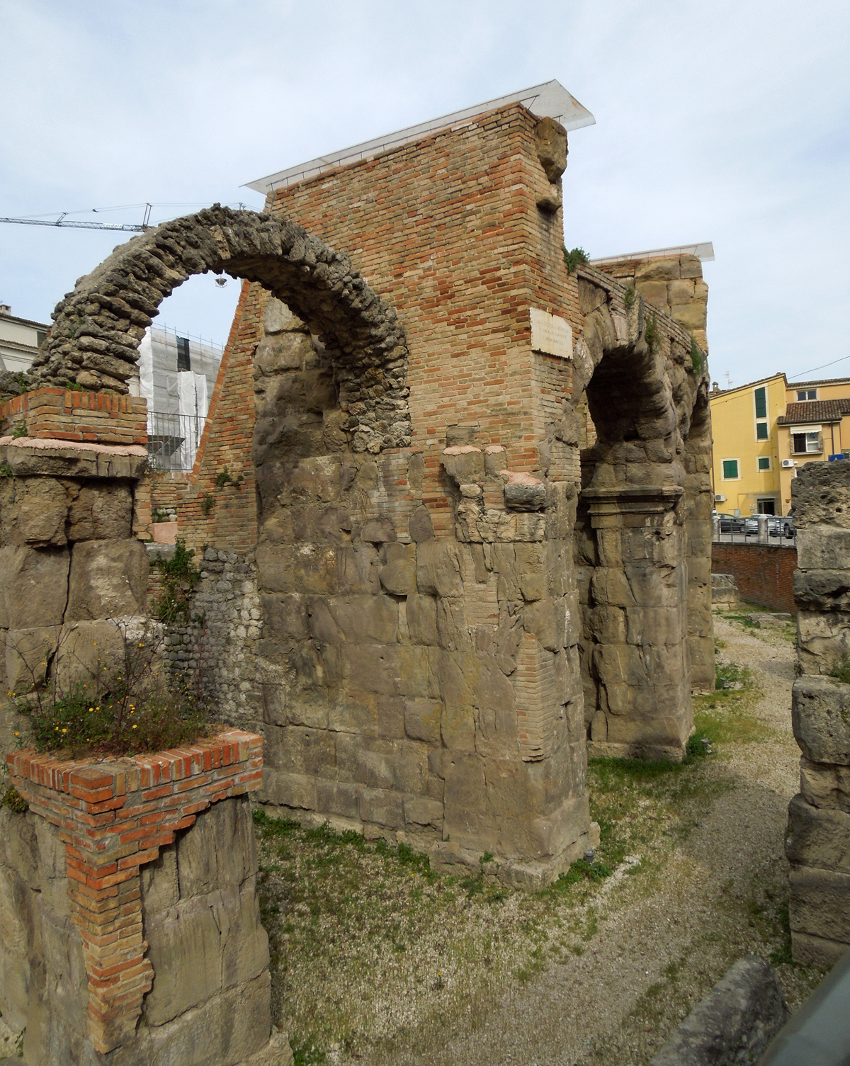 Interno del teatro romano di Teramo.